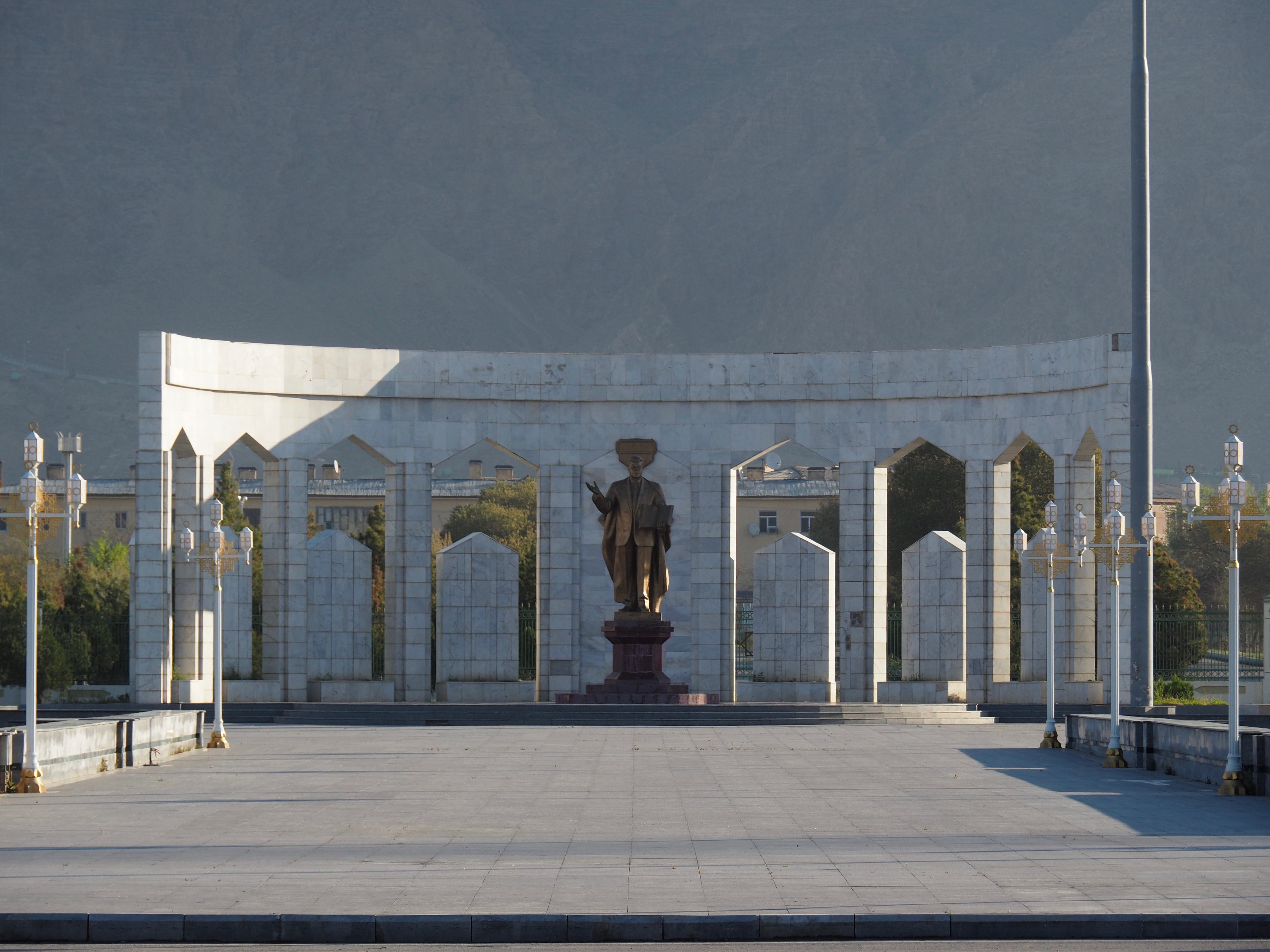 Balkanabat